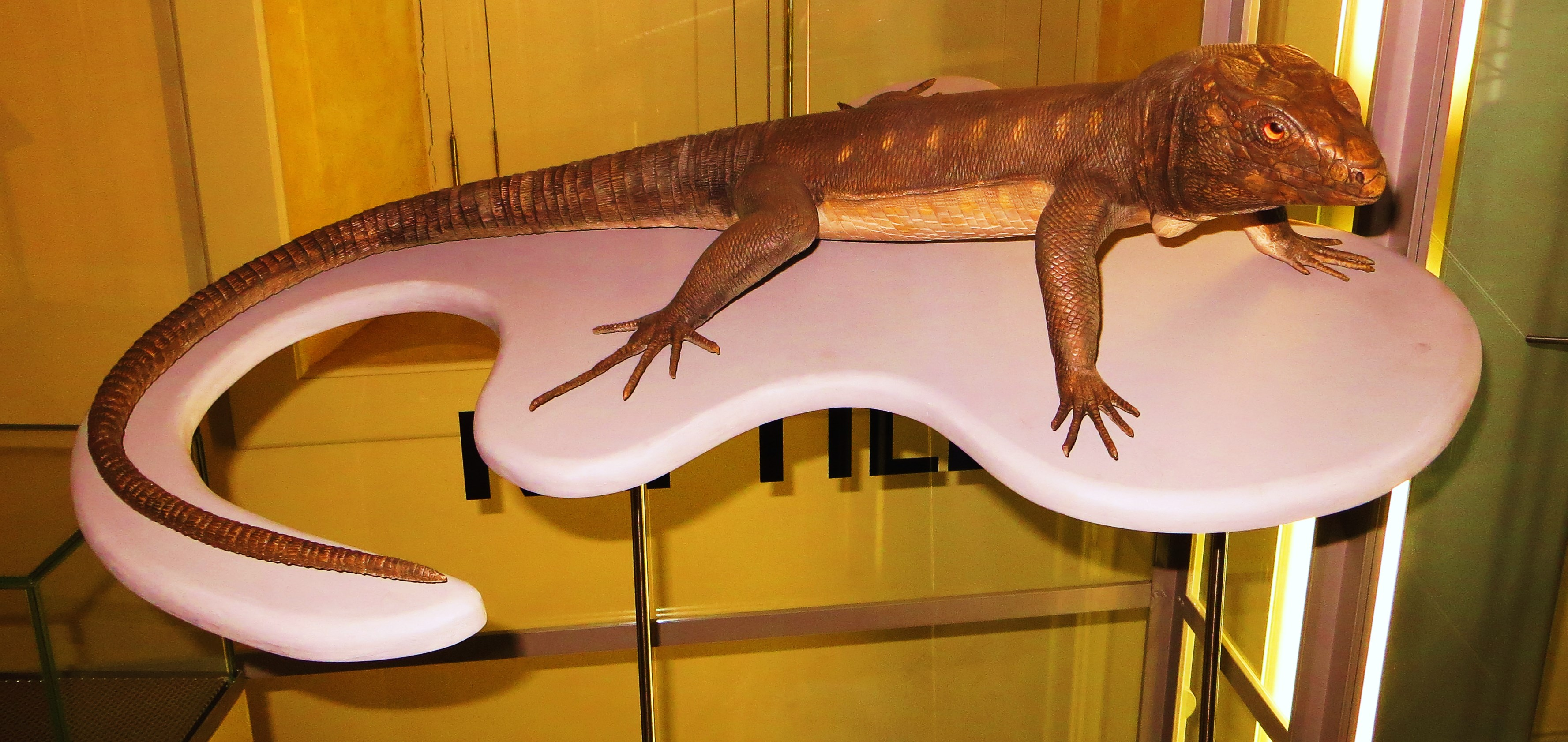 Gallotia, an extinct reptile- Took the picture at Museo de la Naturaleza y el Hombre - Tenerife